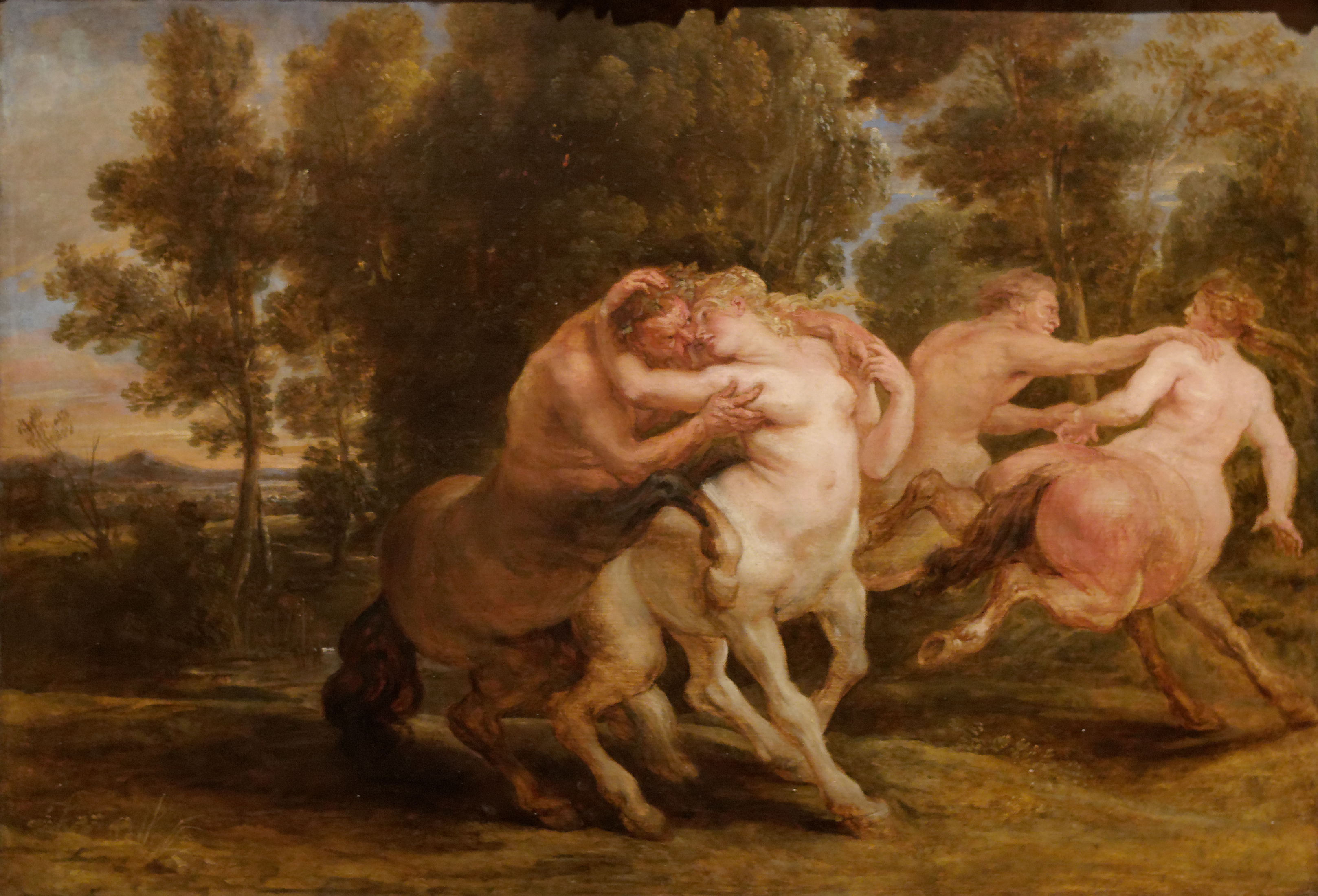 Les amours des Centaures, Pierre Paul Rubens. Huile sur bois Flandre ca 1635. Musée Calouste Gulbenkian, Lisbonne. Inv 394